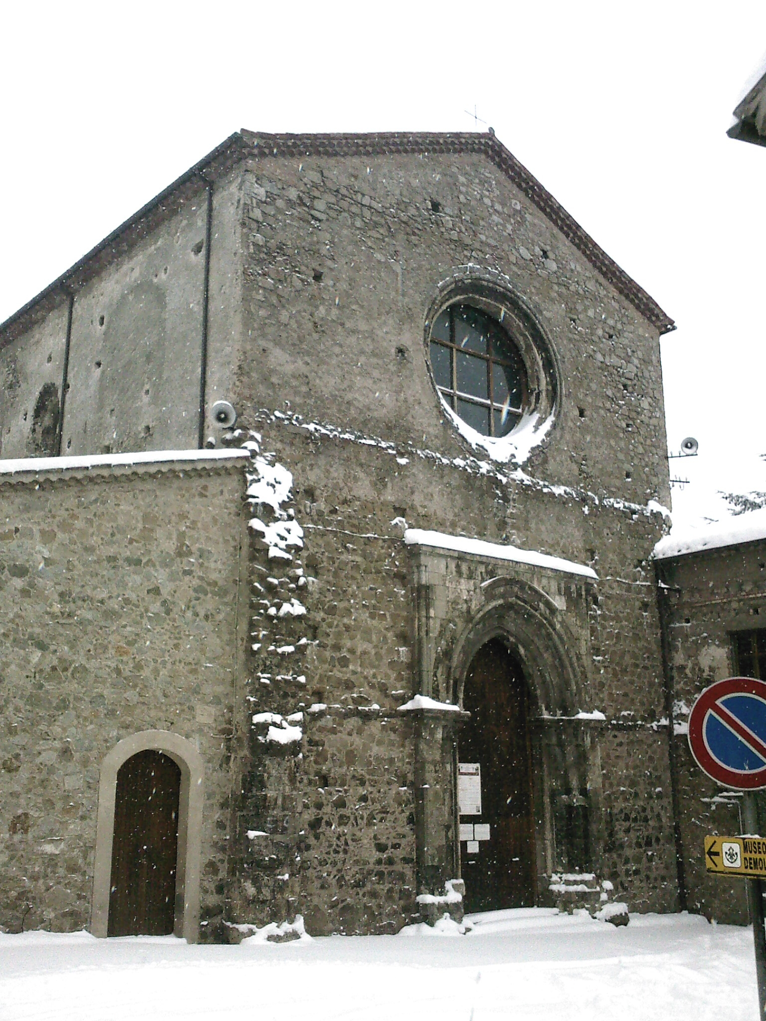 Abbazia innevata 2008